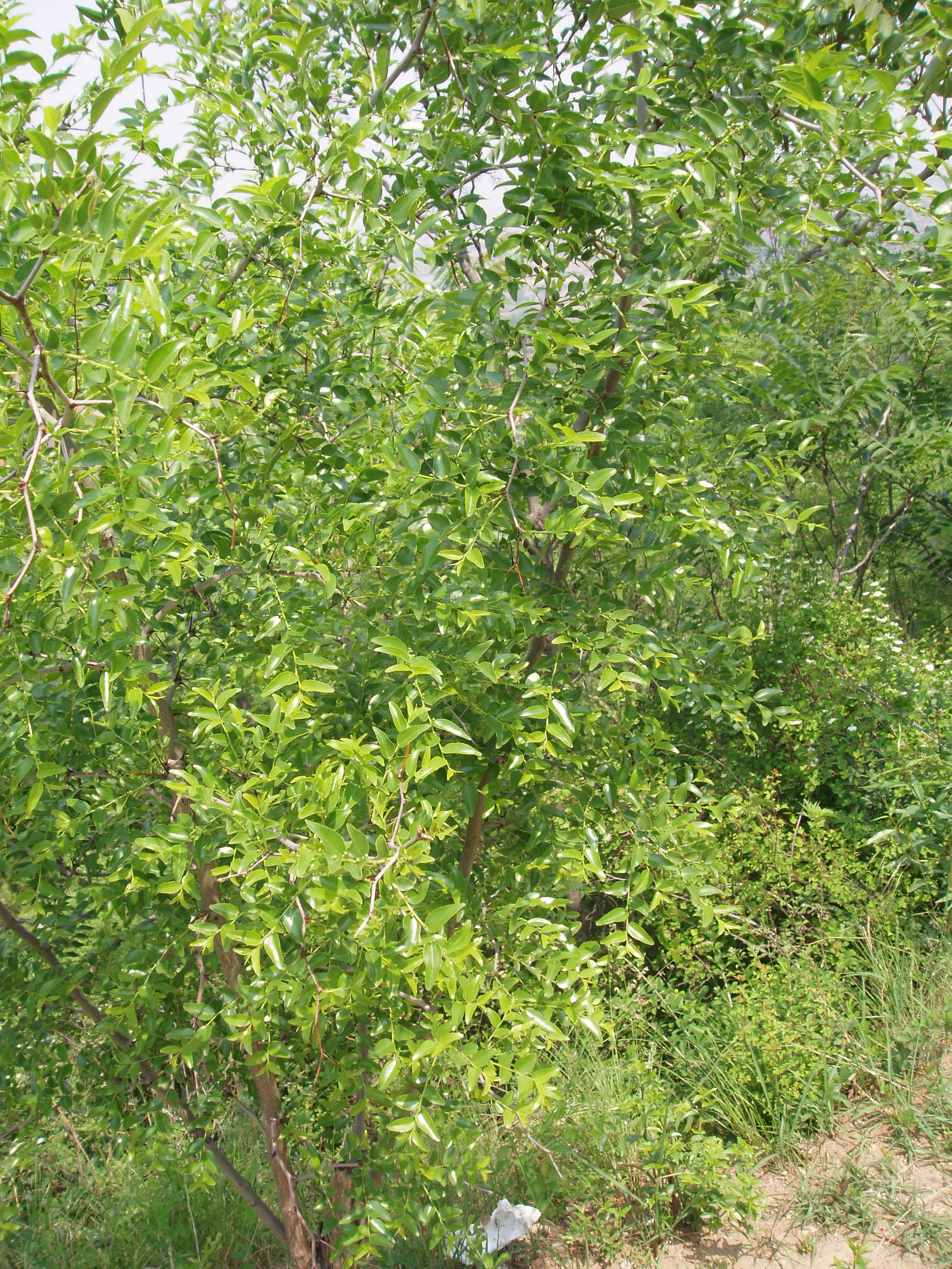 Ziziphus jujuba cv. 'Spinasa'